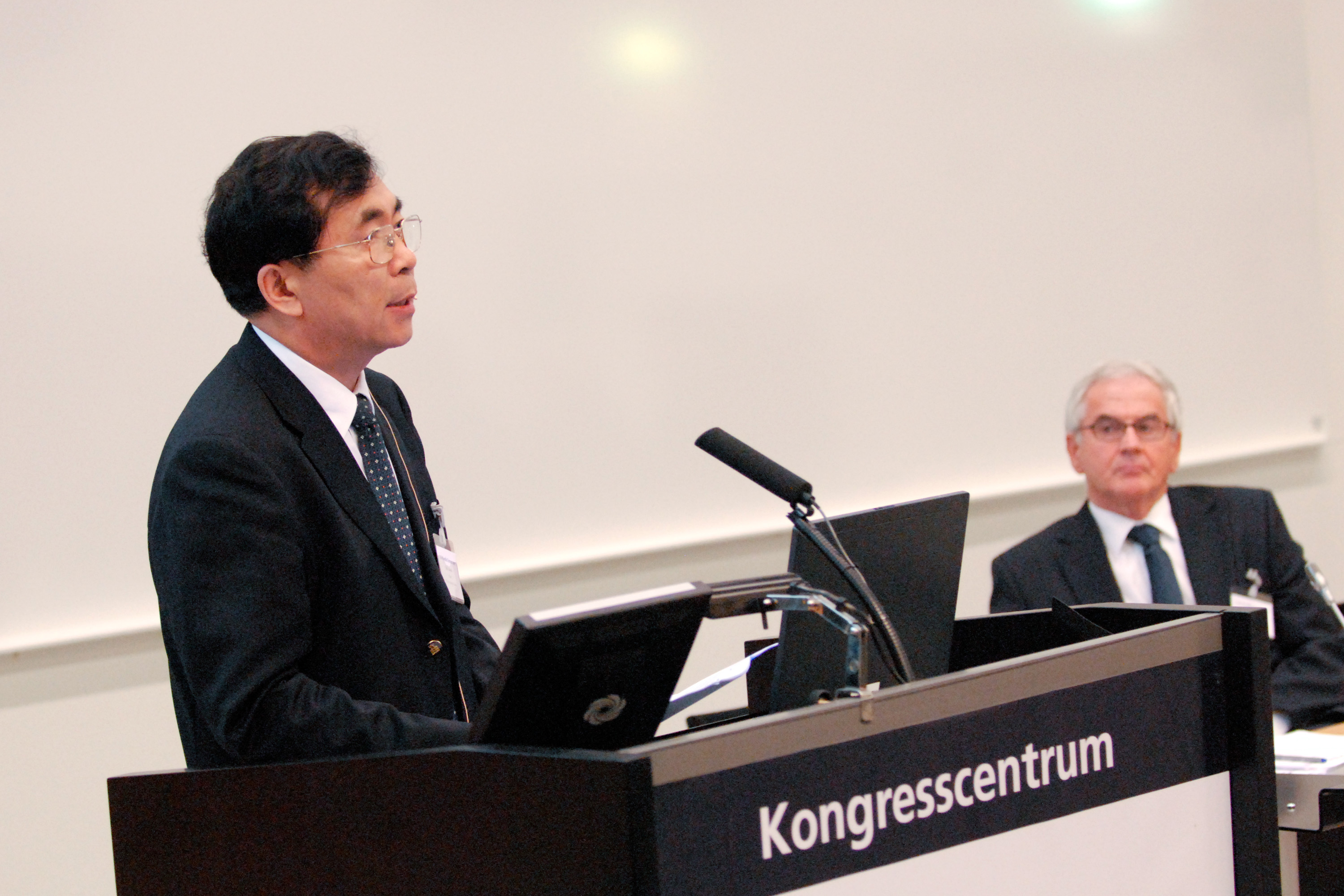 BAI Chunli, vice presidenten för kinas vetenskapsråd talar vid öppnandet av CAS-Nordic 2007 i Lund 2007-09-17